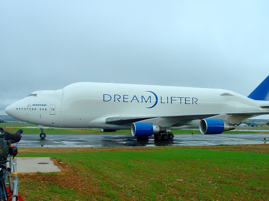 Boing 747-400 LFC Dreamlifter sulla pista dell'aeroporto di Taranto-Grottaglie